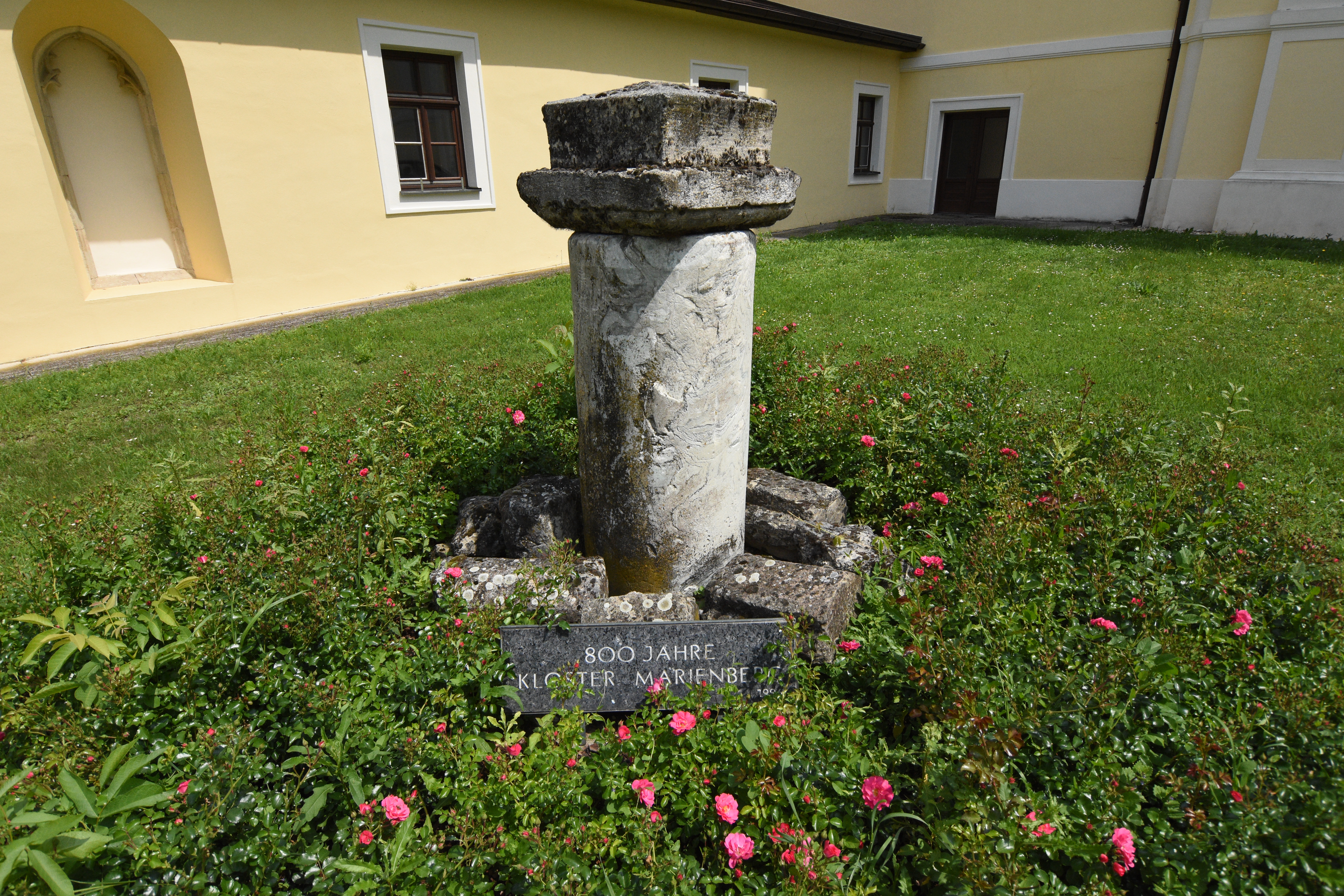 800 Jahre Kloster Marienberg, Burgenland